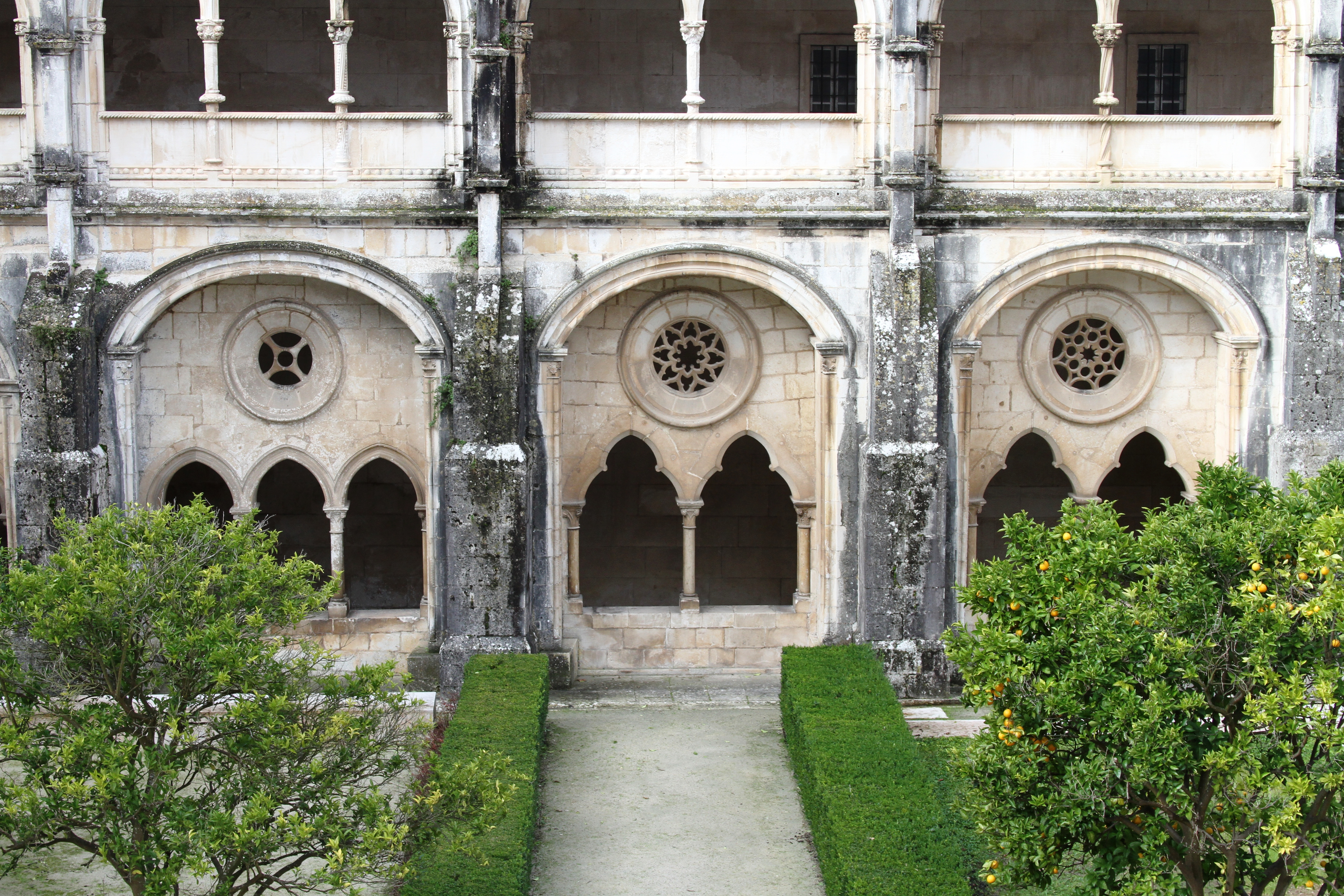 Claustro de D. Dinis